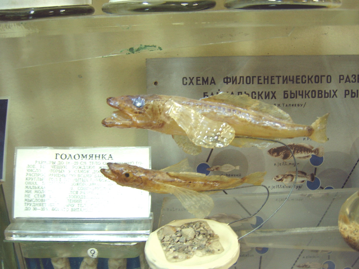 Schaukasten mit Golomianka's (= Fettfische aus dem Baikalsee) im Limnologischen Museum Listwjanka (einem kleinen Dorf am Baikalsee; Listwjanka bedeutet soviel wie "Lärchenwäld'chen).